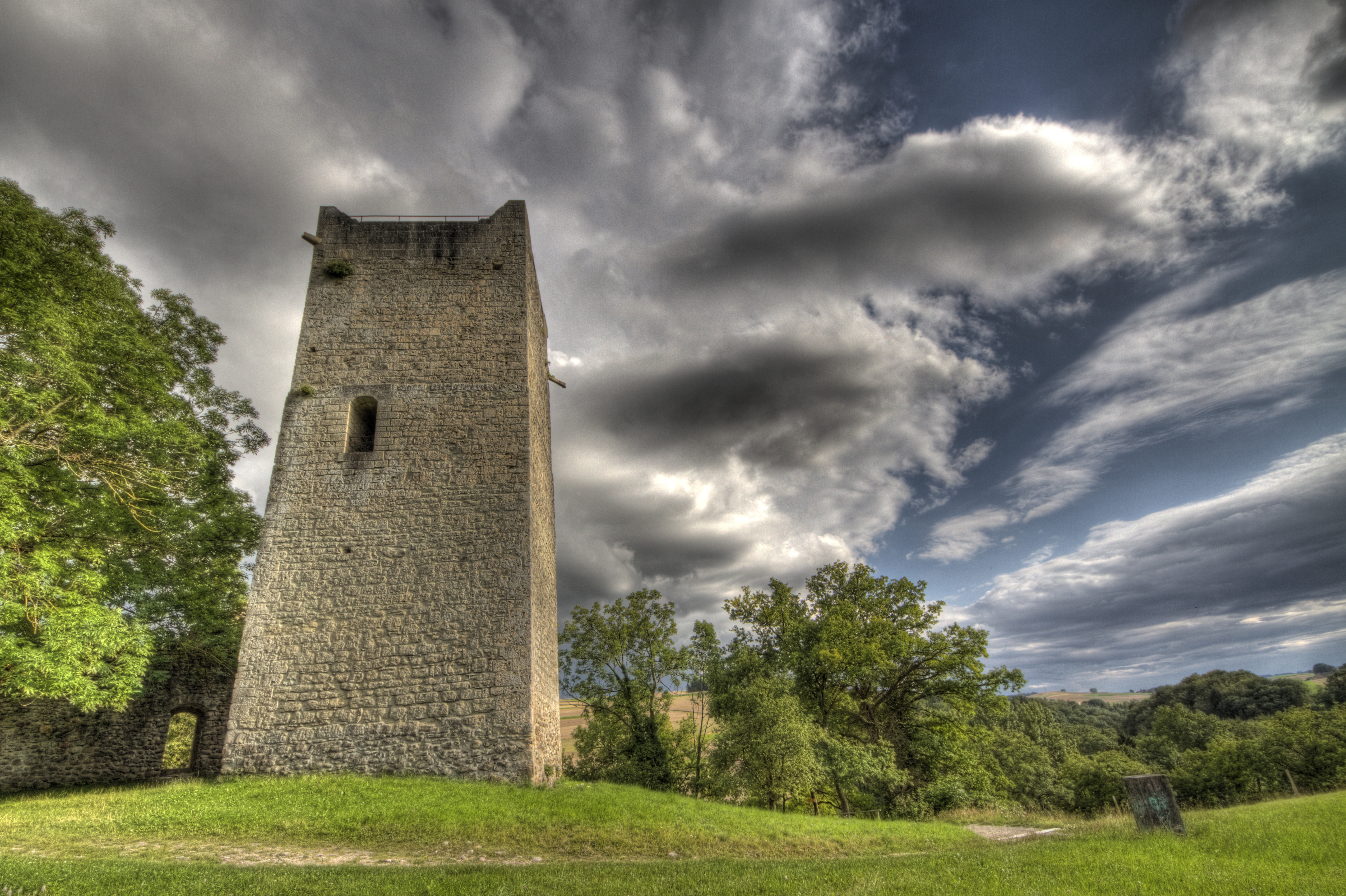 Tour Saint-Martin